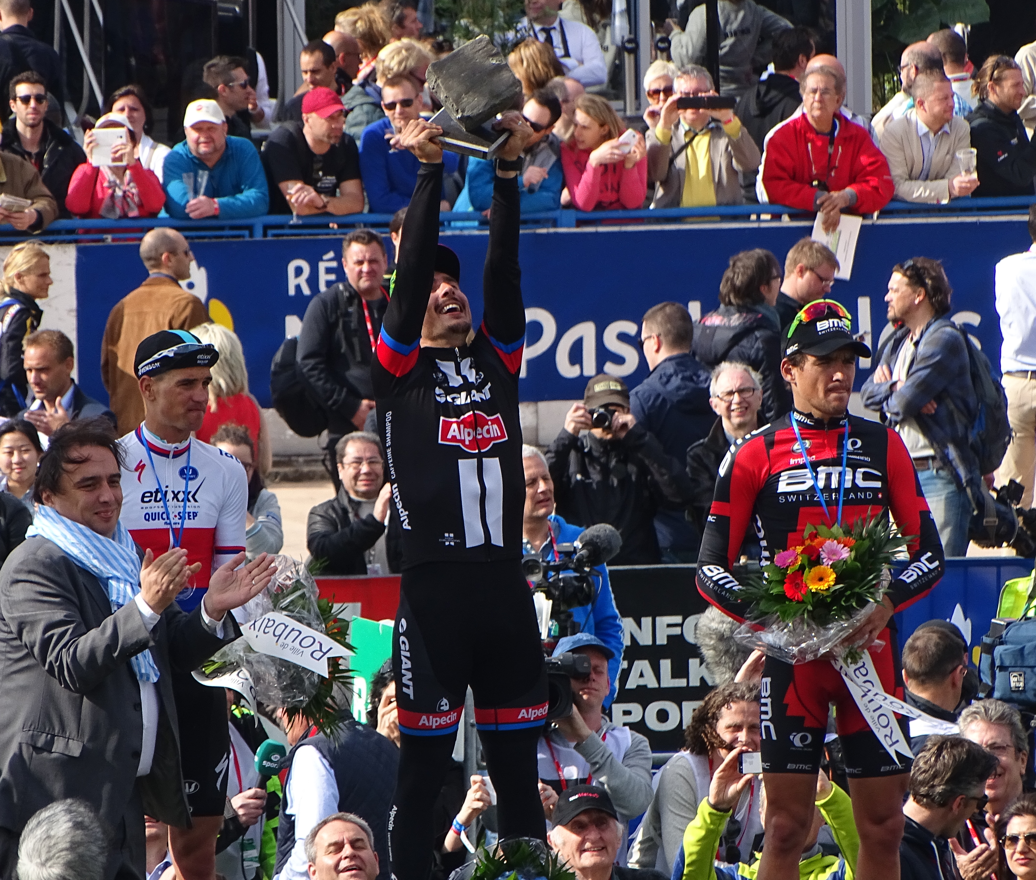 Reportage réalisé le dimanche 12 avril à l'occasion de l'arrivée du Paris-Roubaix 2015 à Roubaix, France.